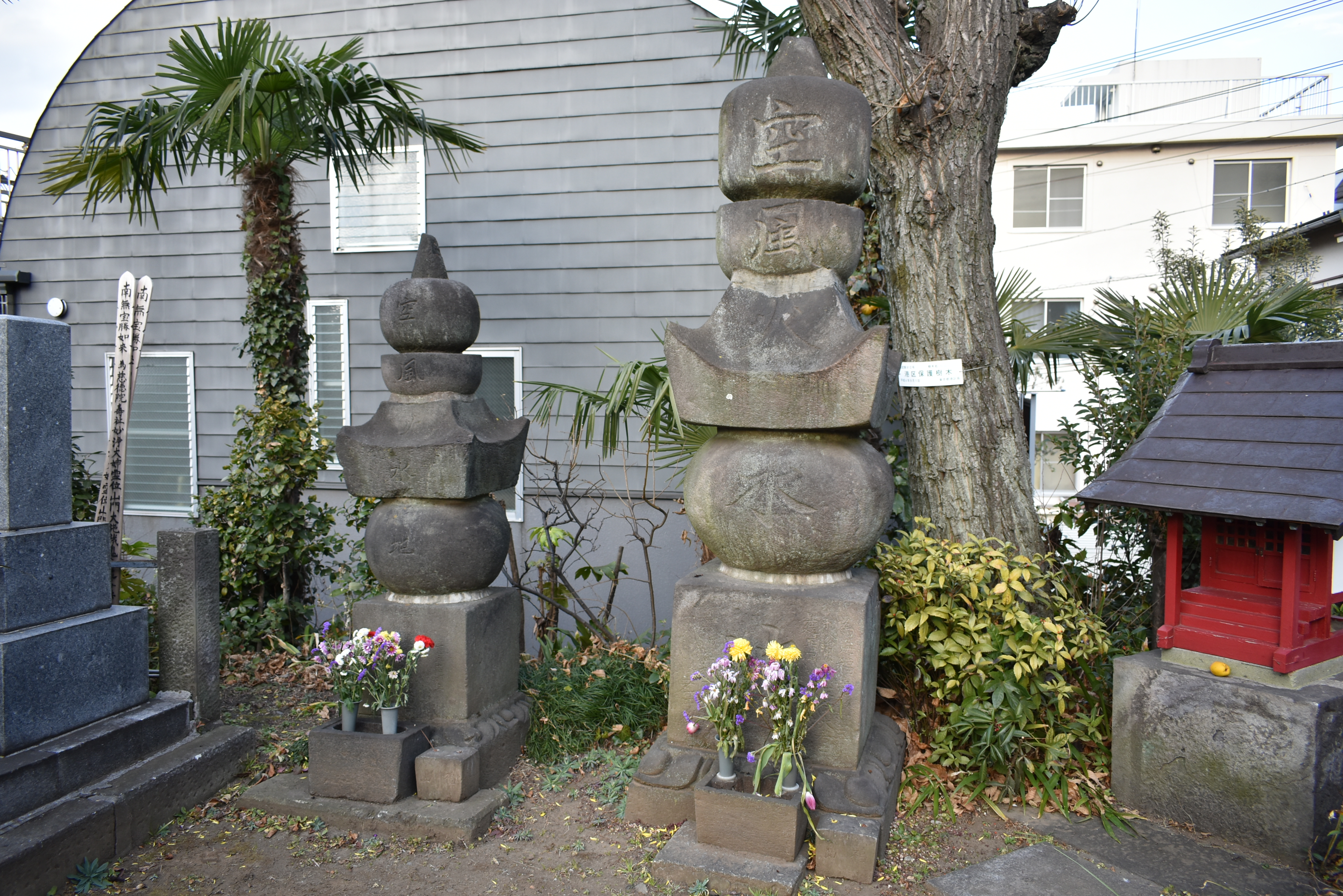 港区三田 正覚院 Nikon D3400